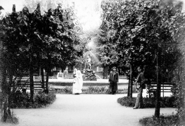 Фонтан Власьевского сквера (ныне площадь Волкова) в Ярославле